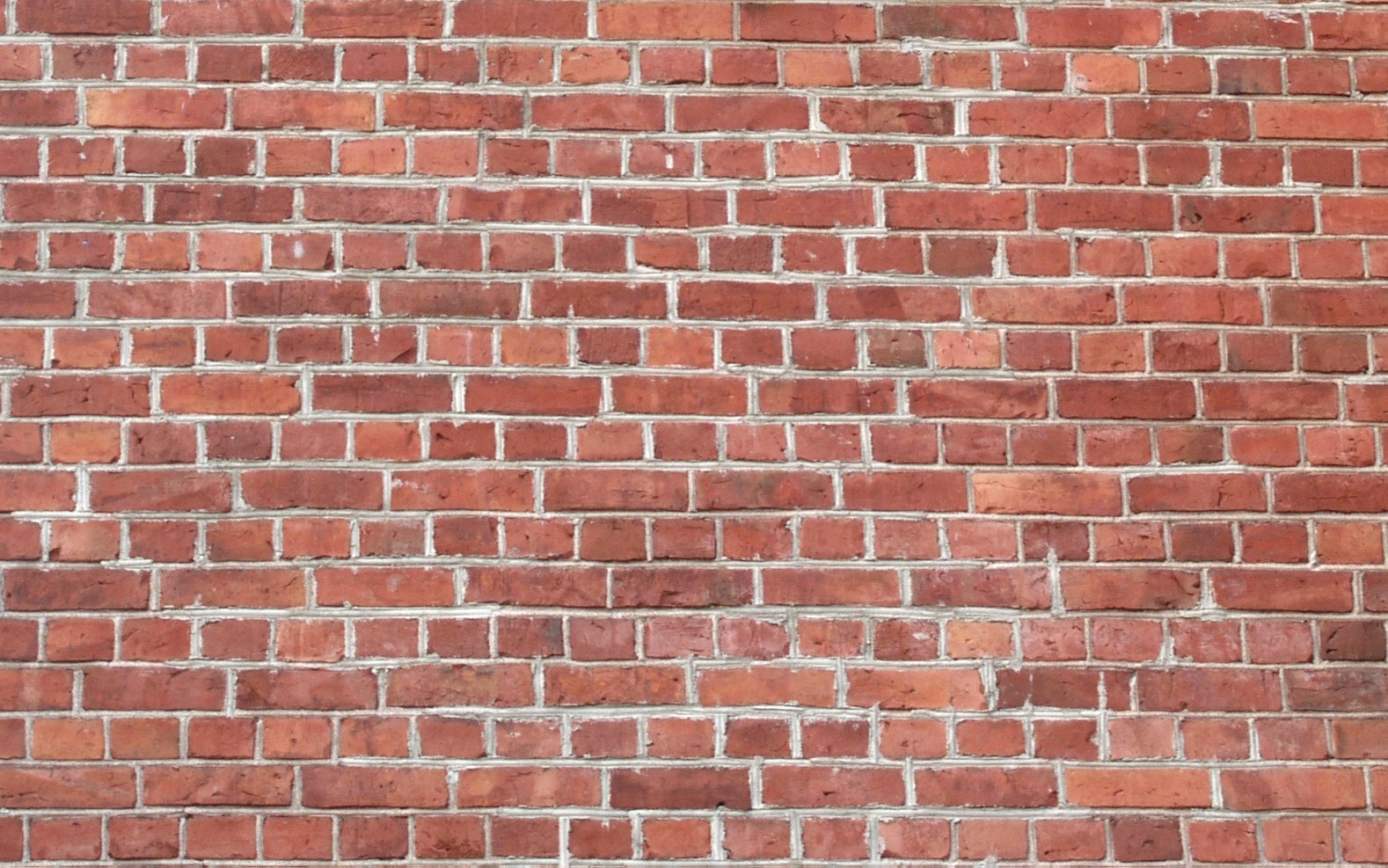 Ny kyrka, Arvika, brick wall.